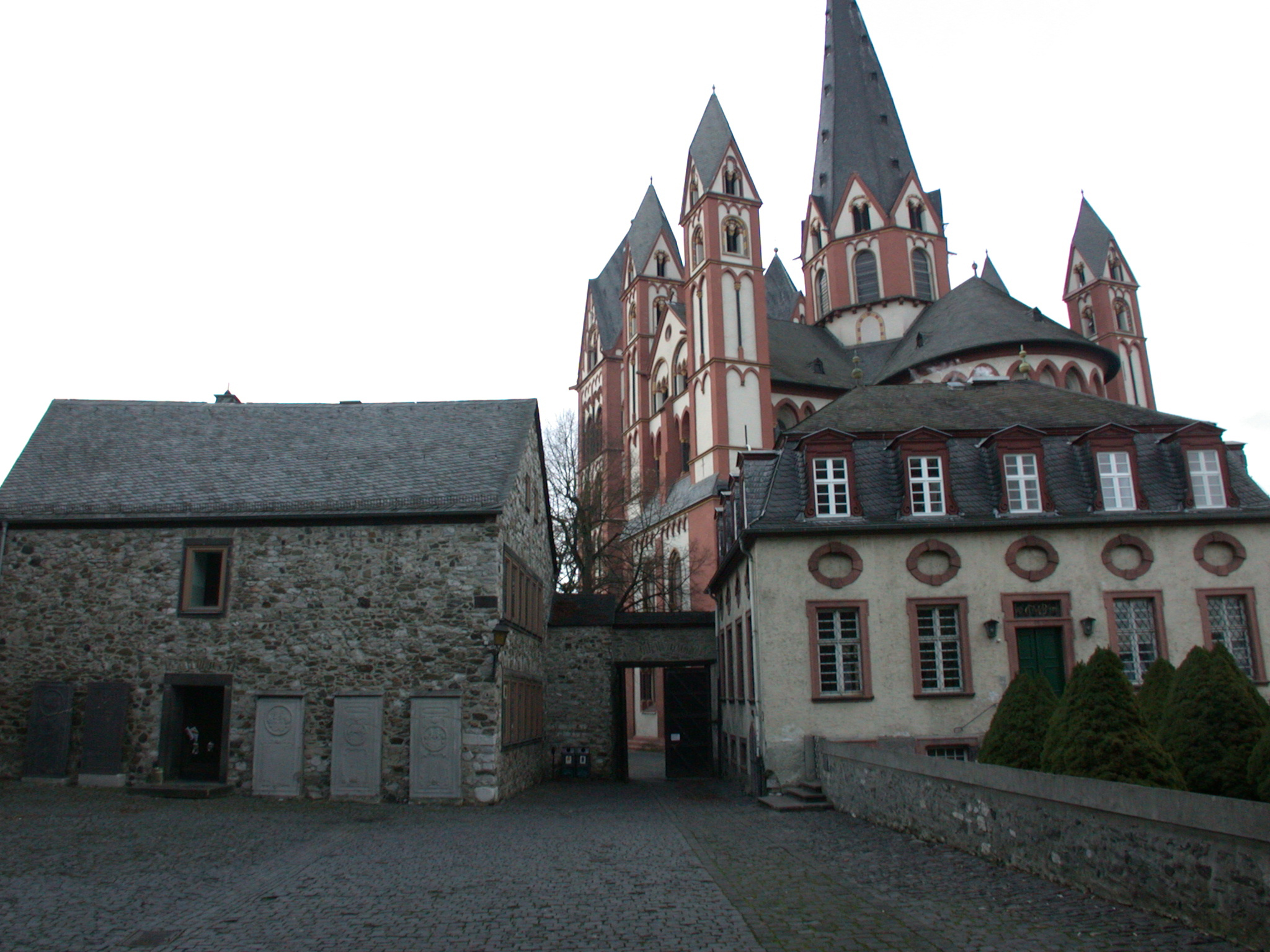 Burg Limburg, Deutschland, Blick in den Innenhof in Richtung Nordwesten, Dom im Hintergrund